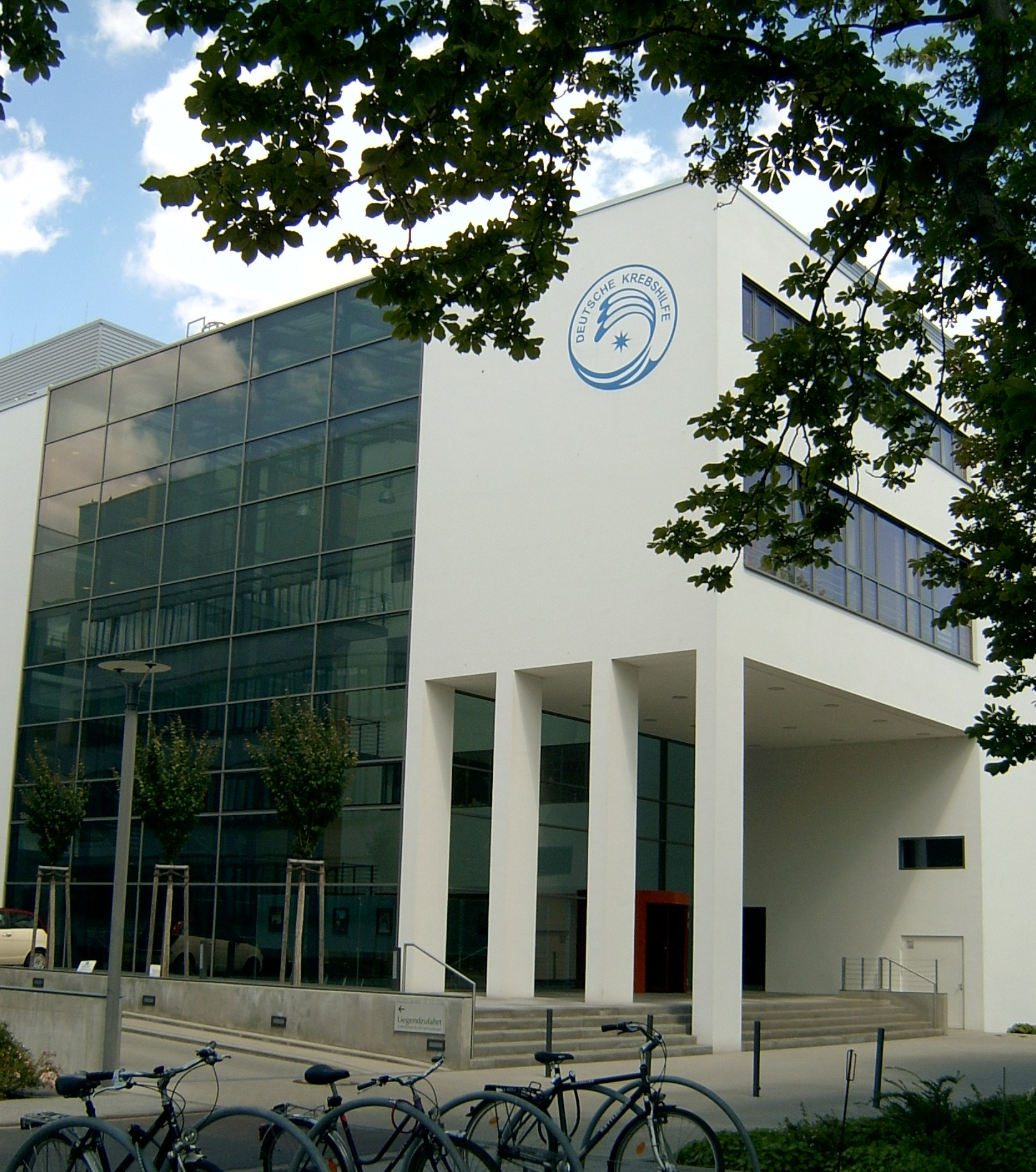 Das Gebäude vom Landeszentrum für Zell- und Gentheraphie der Deutschen Krebshilfe. Das Gebäude ist Teil der Universitätsklinikums Kröllwitz in Halle (Saale)